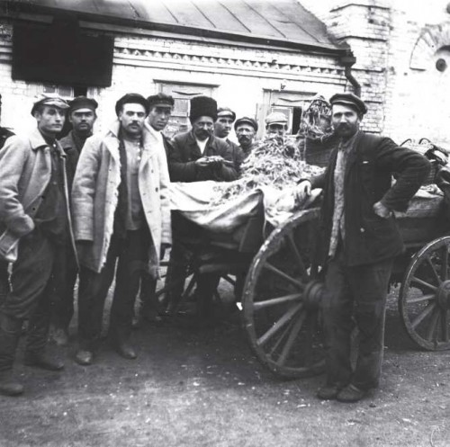 1932. Активисты с.Удачное Донецкой области с конфискованными колосьями около сельсовета